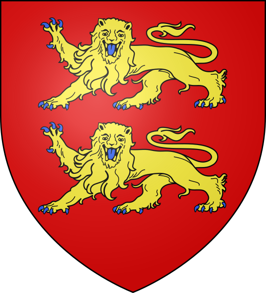 Coat of arms of region Haute-Normandie, France.